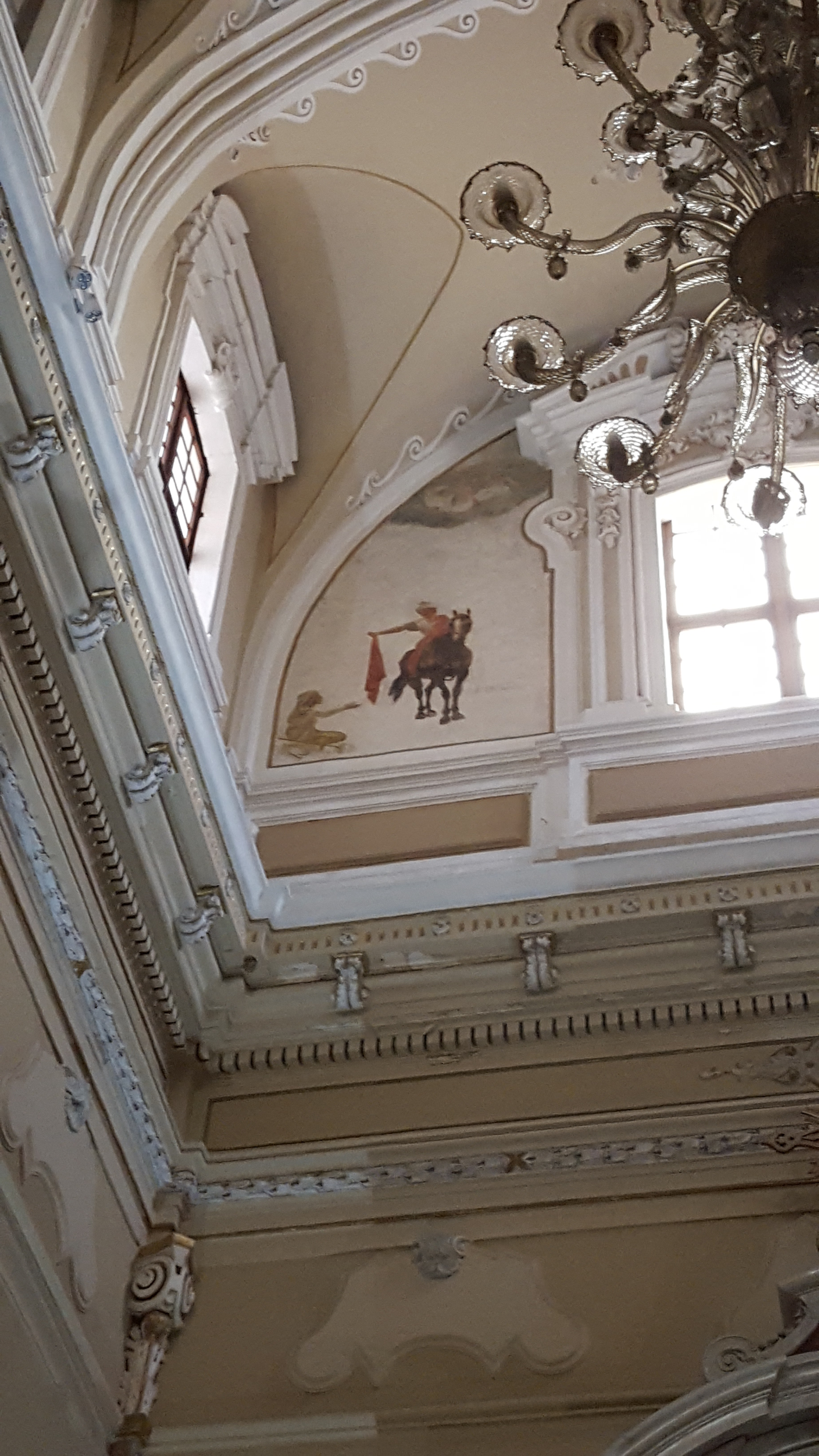 Martino e il Povero - San Martino, Martina franca